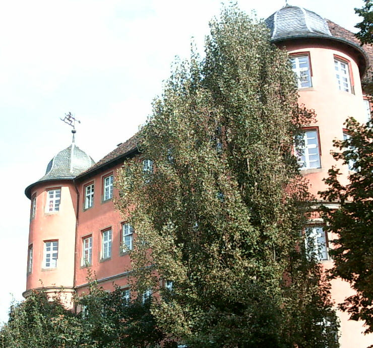 Schloss in Künzelsau